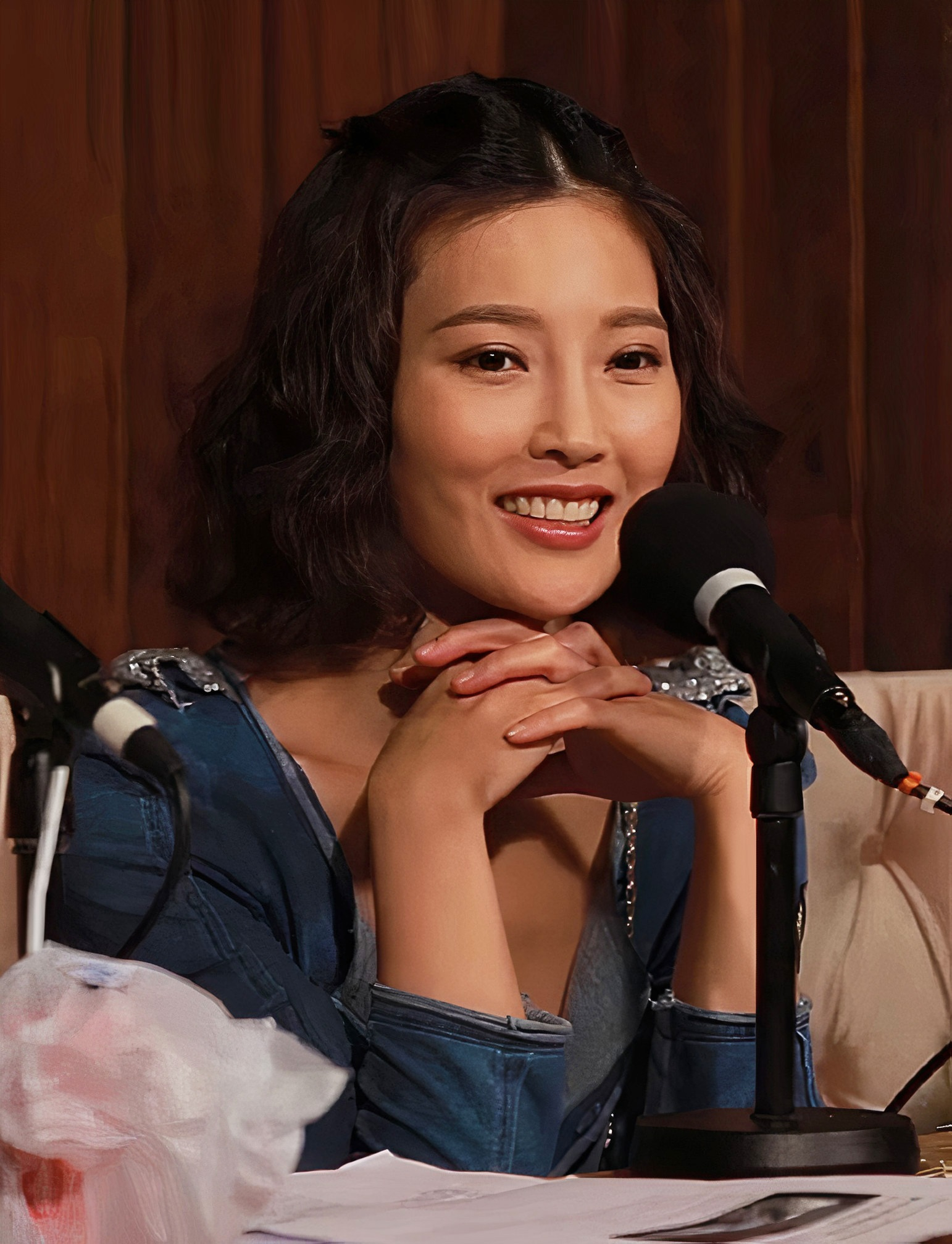 中文（香港）: 香港女性甘草演員，著名作品與角色包括《天幕下的戀人》「高逸嵐」、《最美麗的第七天》「朱莉莉（Julie）」、《與敵同行》「張頌思」、《有營煮婦》「游怡（Elaine）」、《愛·回家》「管美琪（Maggie）」和《迷》「周紹婷（Nat哥）」等。